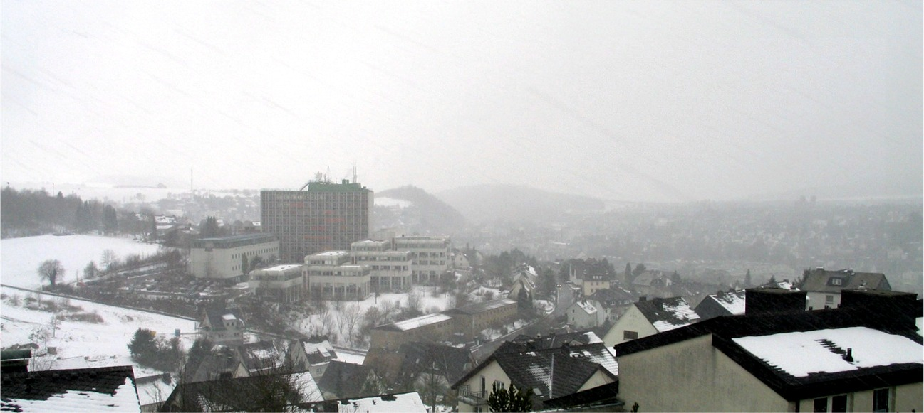 Meschede im Winter 2004 * Fotograf: Nicolai Schäfer